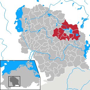 Amt Mildenitz in Mecklenburg-Vorpommern - District Parchim